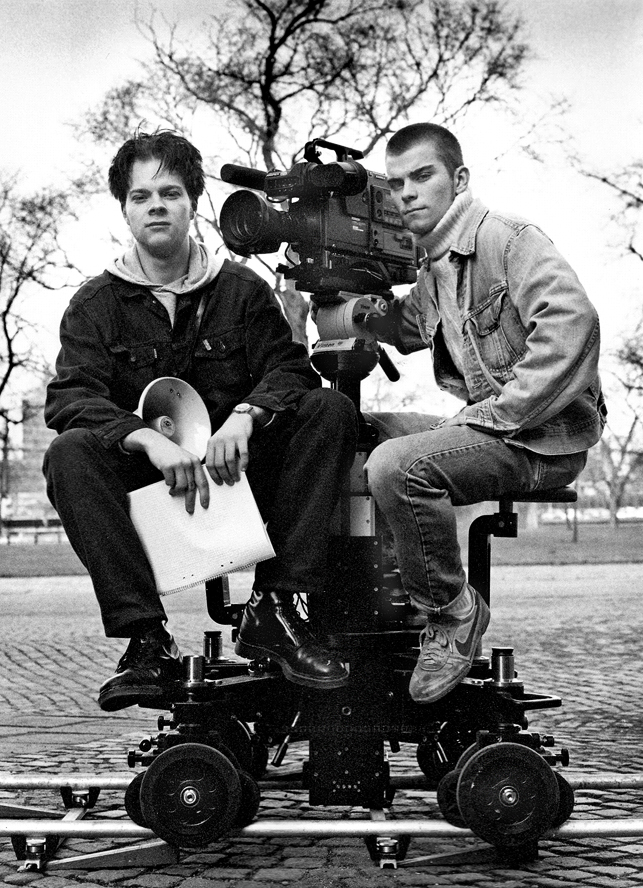 Filmregissör och Filmfotograf - Patrik Book & Mattias Malmgren. Malmö 1992.